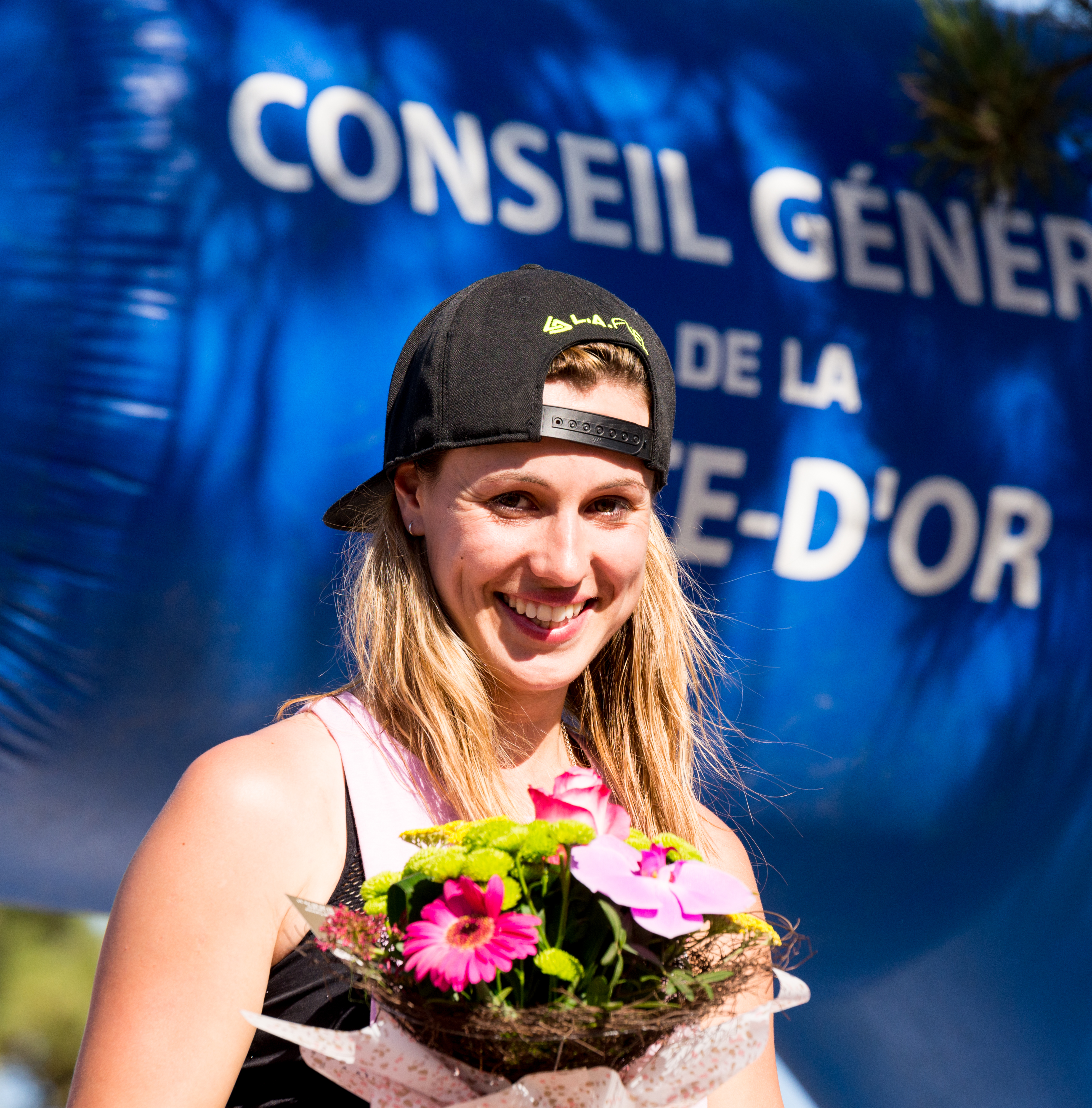 Livia Lancelot gagnante de la finale du championnat de France motocross féminin 2015 organisé par l'Association Moto Club Issois (AMC Issois) le dimanche 28 juin 2015. (Is-sur-Tille, Côte d'Or, Bourgogne, France).